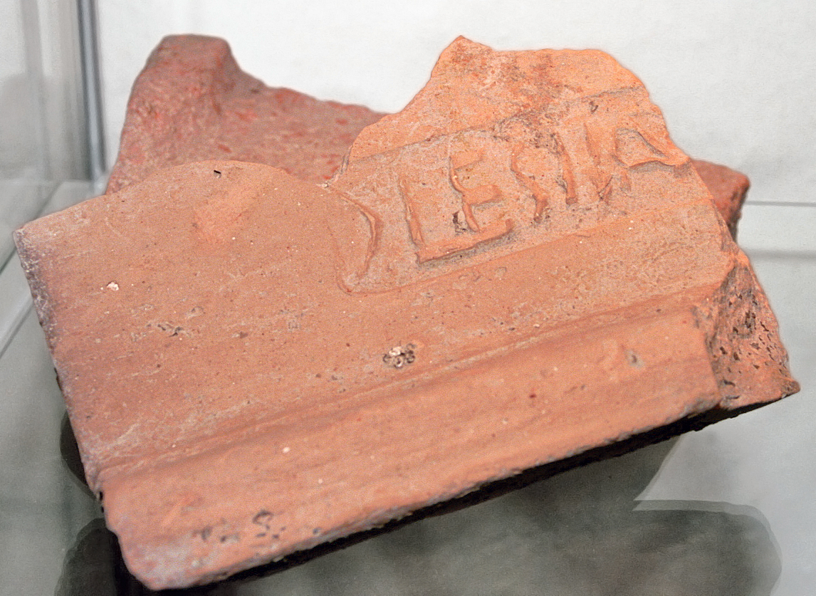 Kastell Szentendre (Ulcisia Castra), Ungarn: Ein vom Kastell in Szentendre stammender Ziegelstempel der im südlichen Aquincum (Budapest) stationierten Legio II Adiutrix. Aufgenommen während der provinzialrömischen Sonderausstellung „Visegrád évszázadai – A római kor kezdete a Dunakanyarban“ die vom 19.08.2011 bis 20.07.2012 im Mátyás Király Múzeum (König-Matthias-Museum), Visegrád, stattfand.